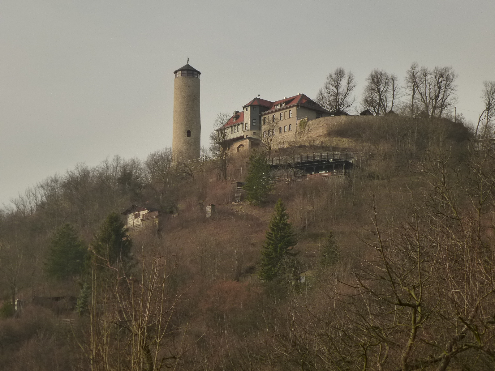 Blick von Ziegenhain